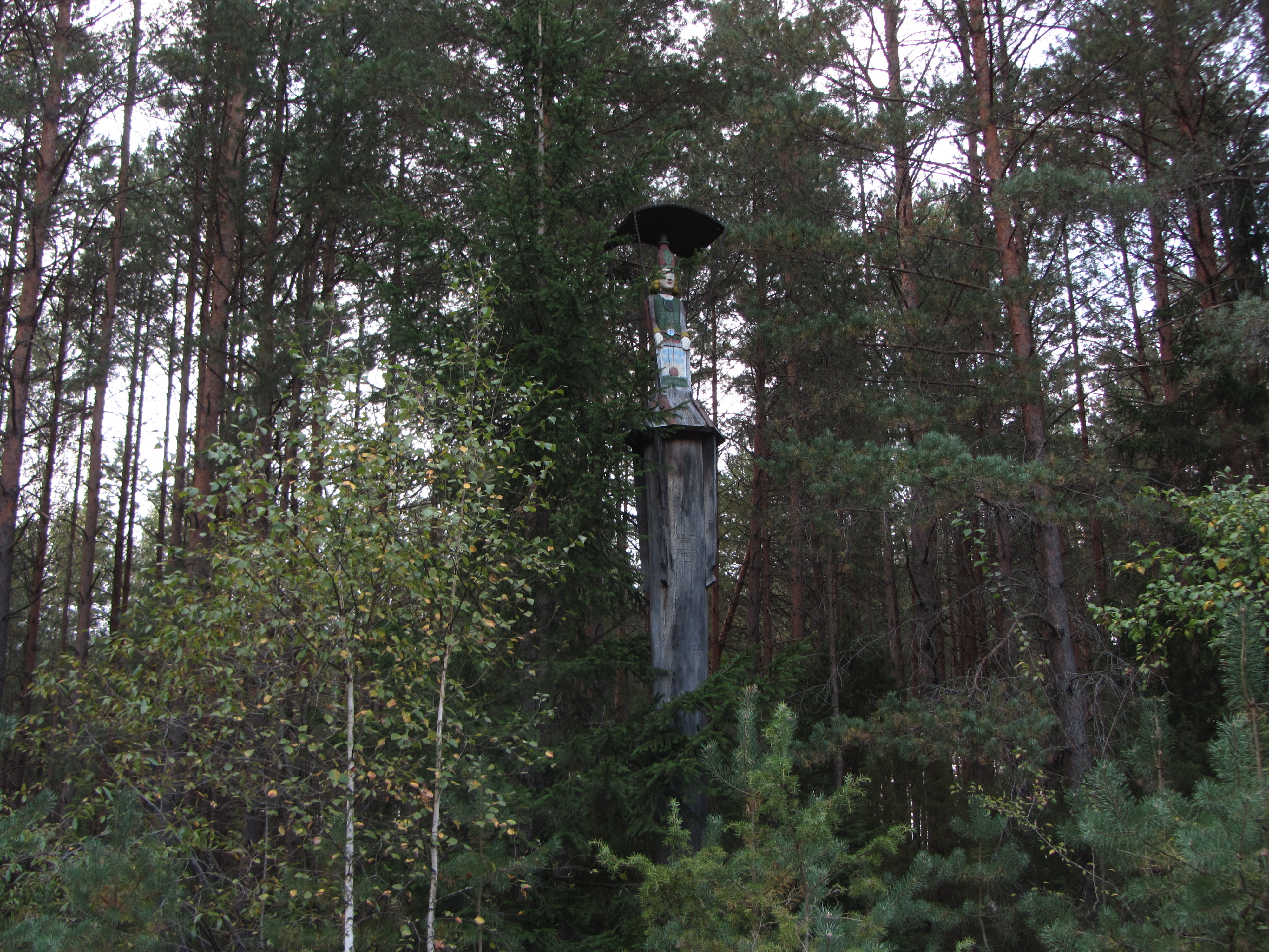 Viečiūnų sen., Lithuania